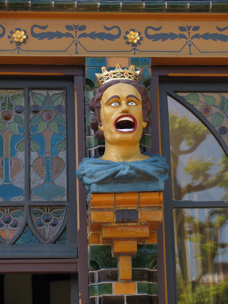 Gaper in Zuiderzeemuseum